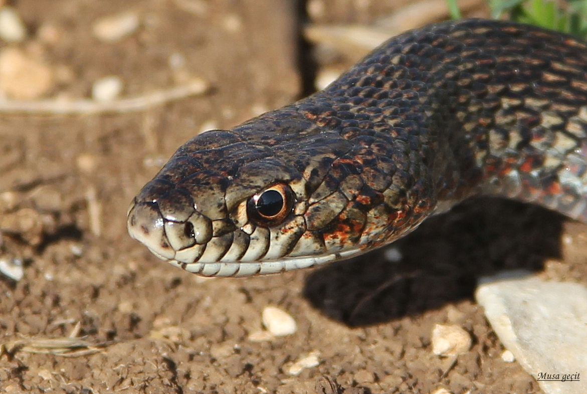 Dolichophis jugularis